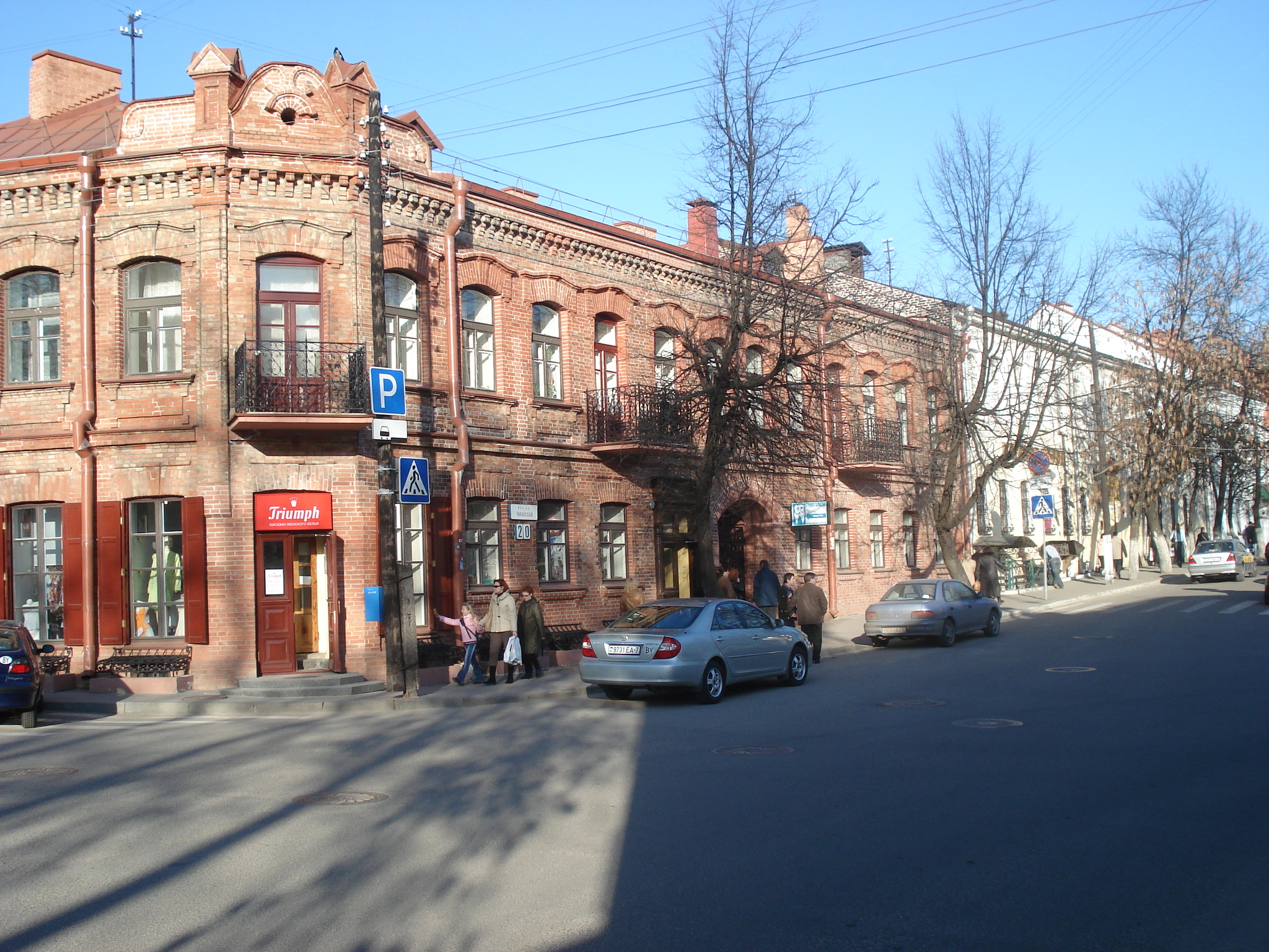 Rakaǔskaja street